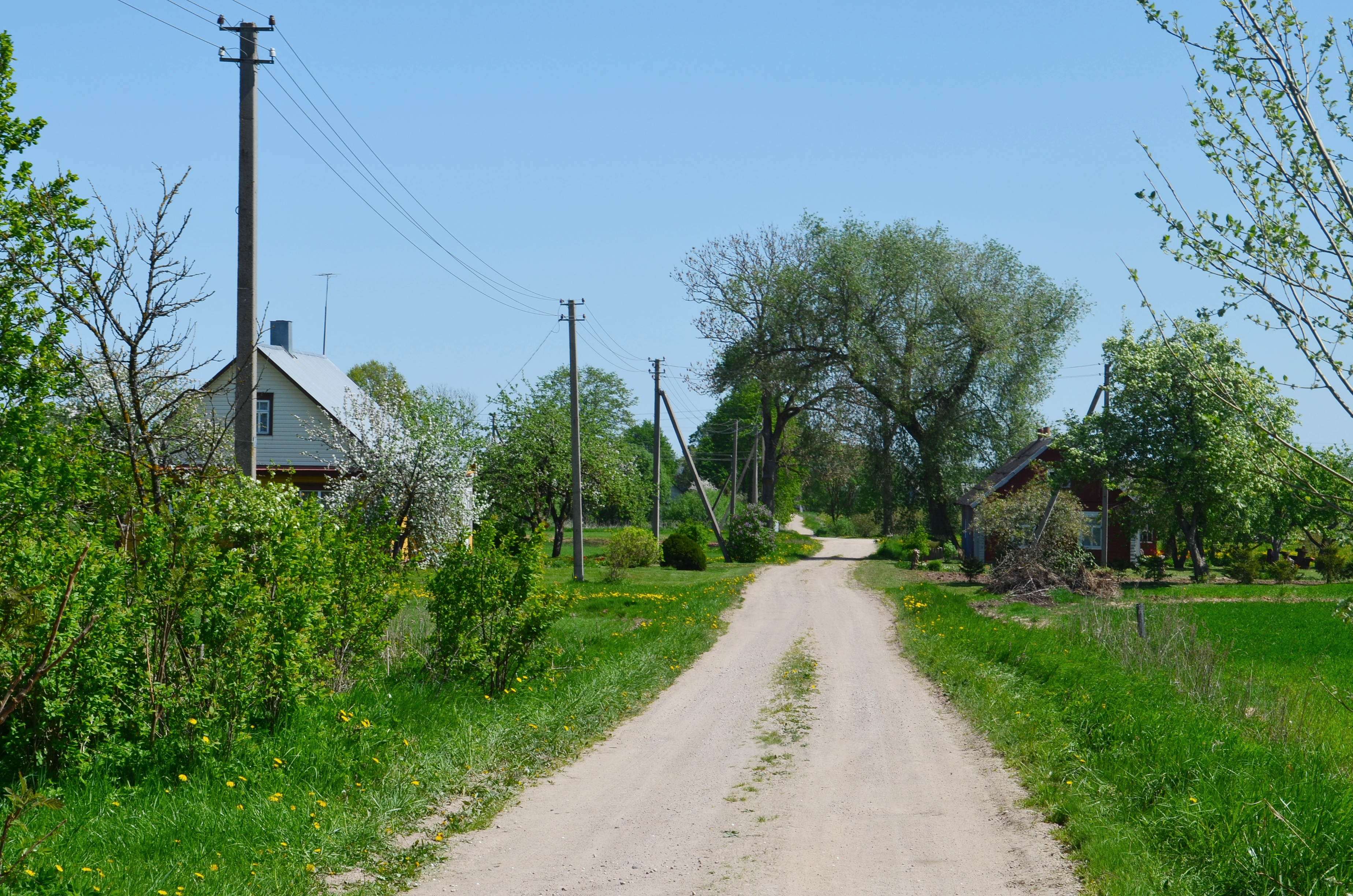 Maželiai, Kavarsko sen., Anykščių raj.